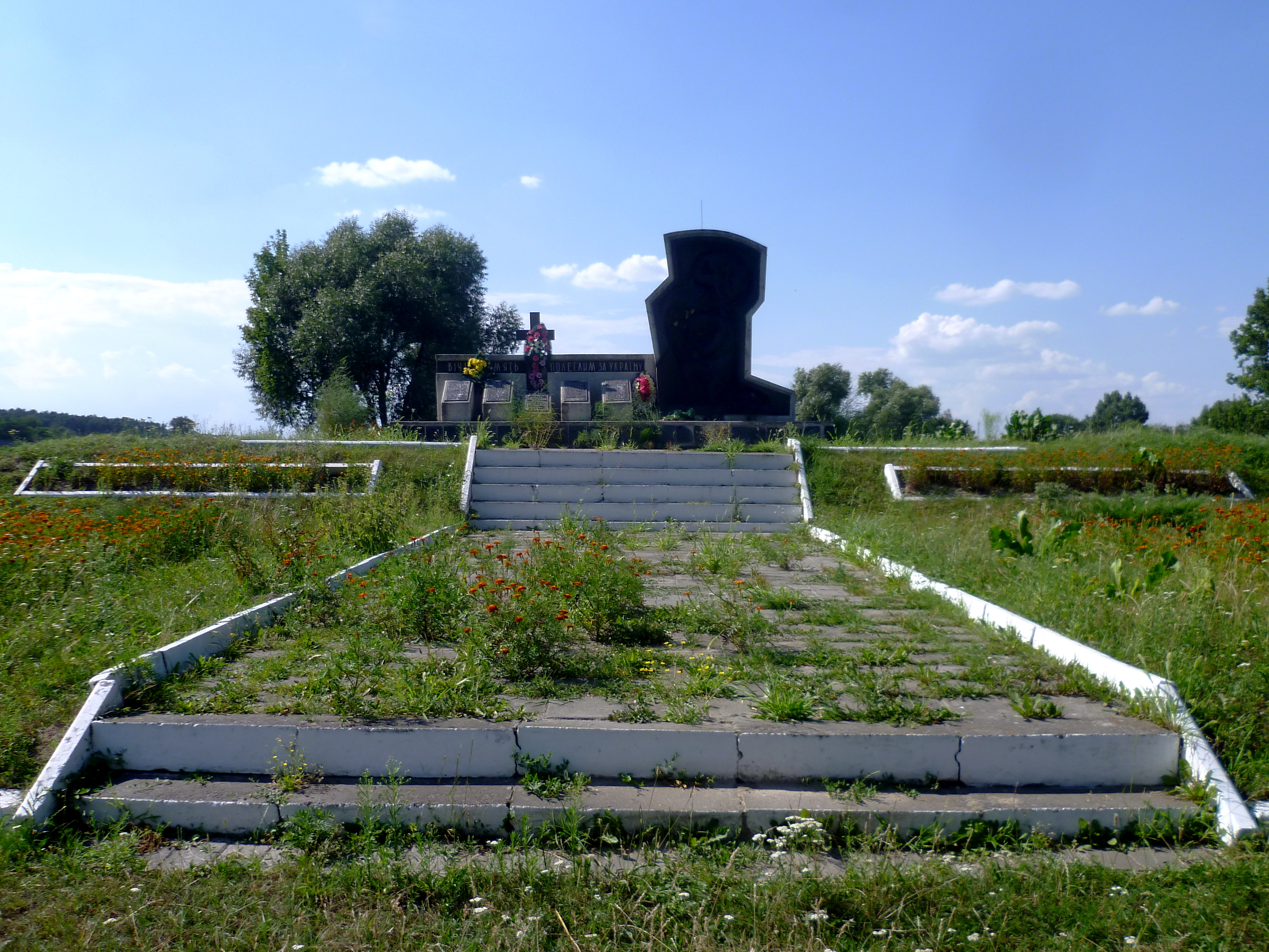 Пам’ятник односельчанам, полеглим за Україну в роки ІІ світової війни (1997 рік) - загальний вигляд - с.Терешківці (біля церкви) Горохівський район Волинська область Україна